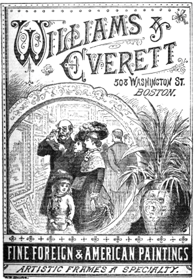 Boston, Massachusetts